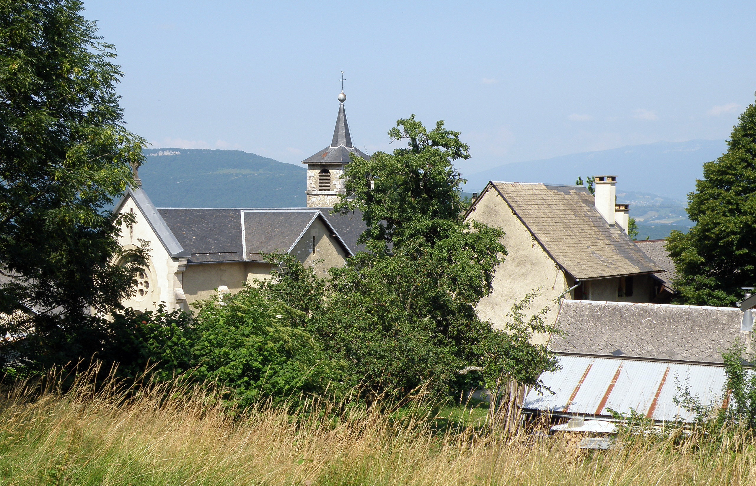 La Chapelle-du-Mont-du-Chat, comm. du département de la Savoie (région Rhône-Alpes, France), sur la rive occidentale du lac du Bourget. Aspect du village. À gauche, église paroissiale Saint-Antoine.